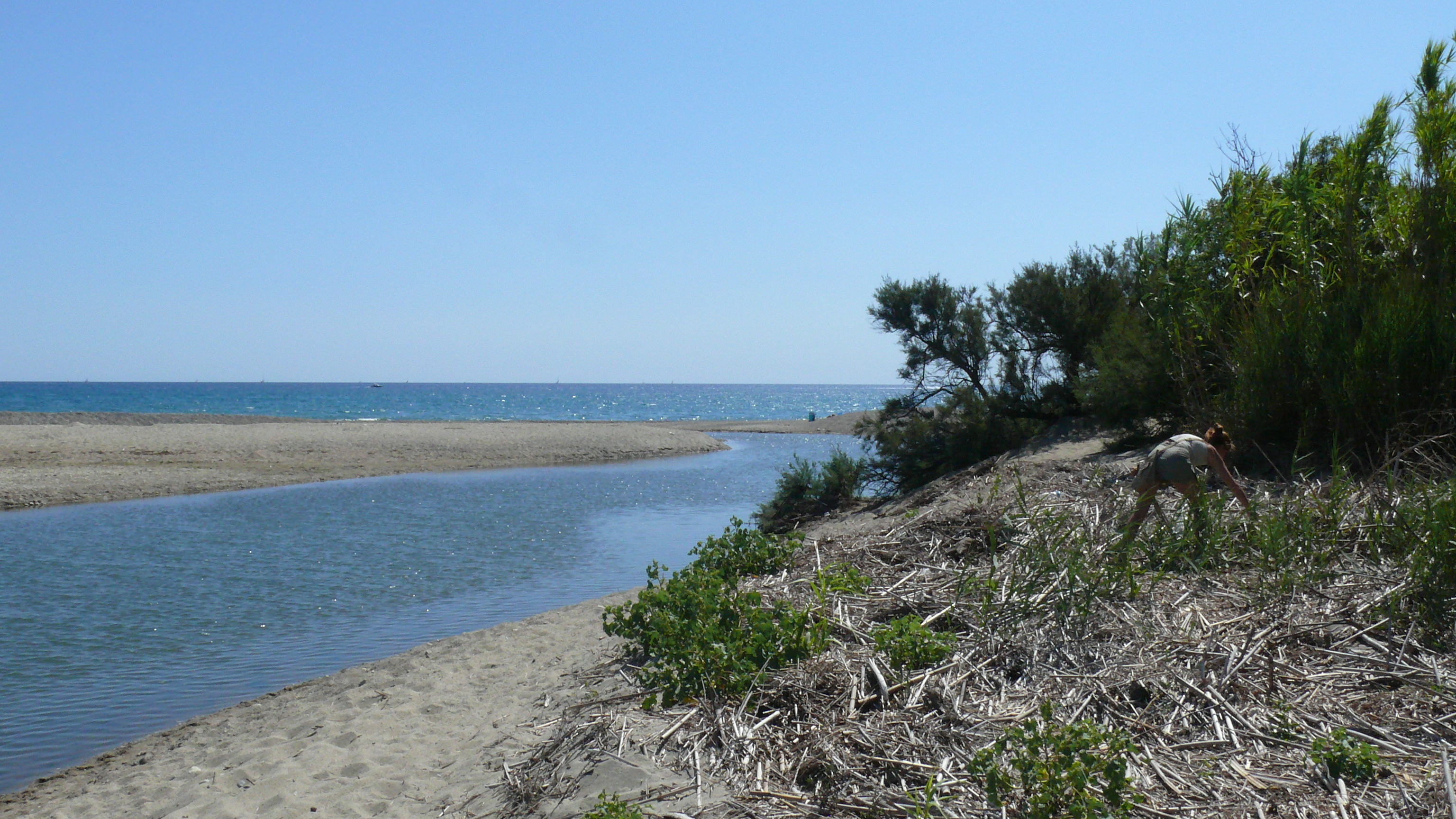 Embouchure du Tech dans la mer méditéranée à la réserve naturelle du Mas Larrieu sur la commune d'Argelès sur Mer avec vue coté mer